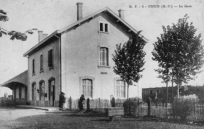 Le bâtiment voyageurs de la gare d'Ossun, avant l'électrification de la ligne, au début des années 1900.